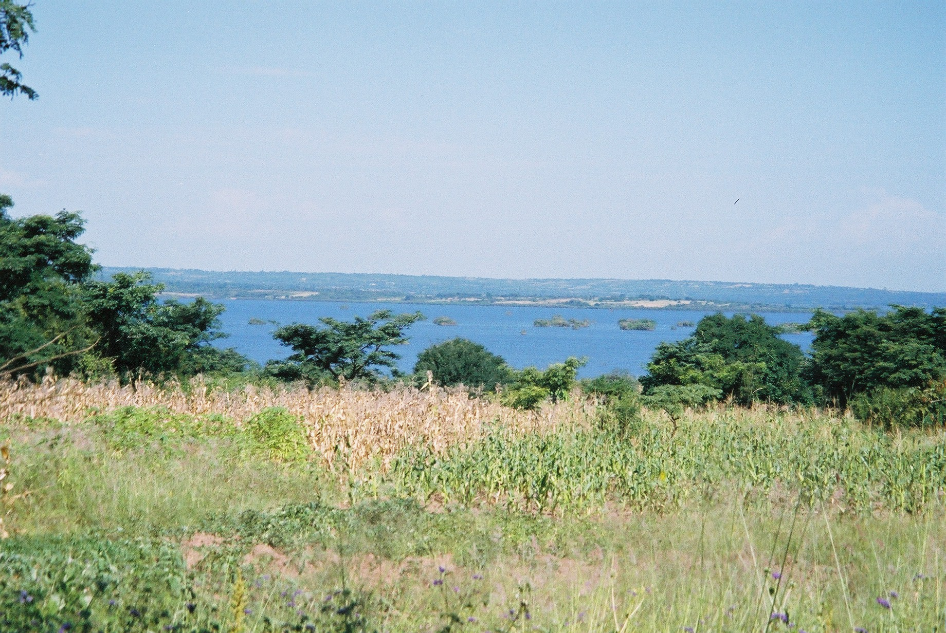 Le lac Kanyaboli vu de la rive nord (en venant de Hawinga)